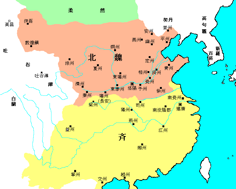 北魏･斉 歴史地図をもとに投稿者が作成しました。